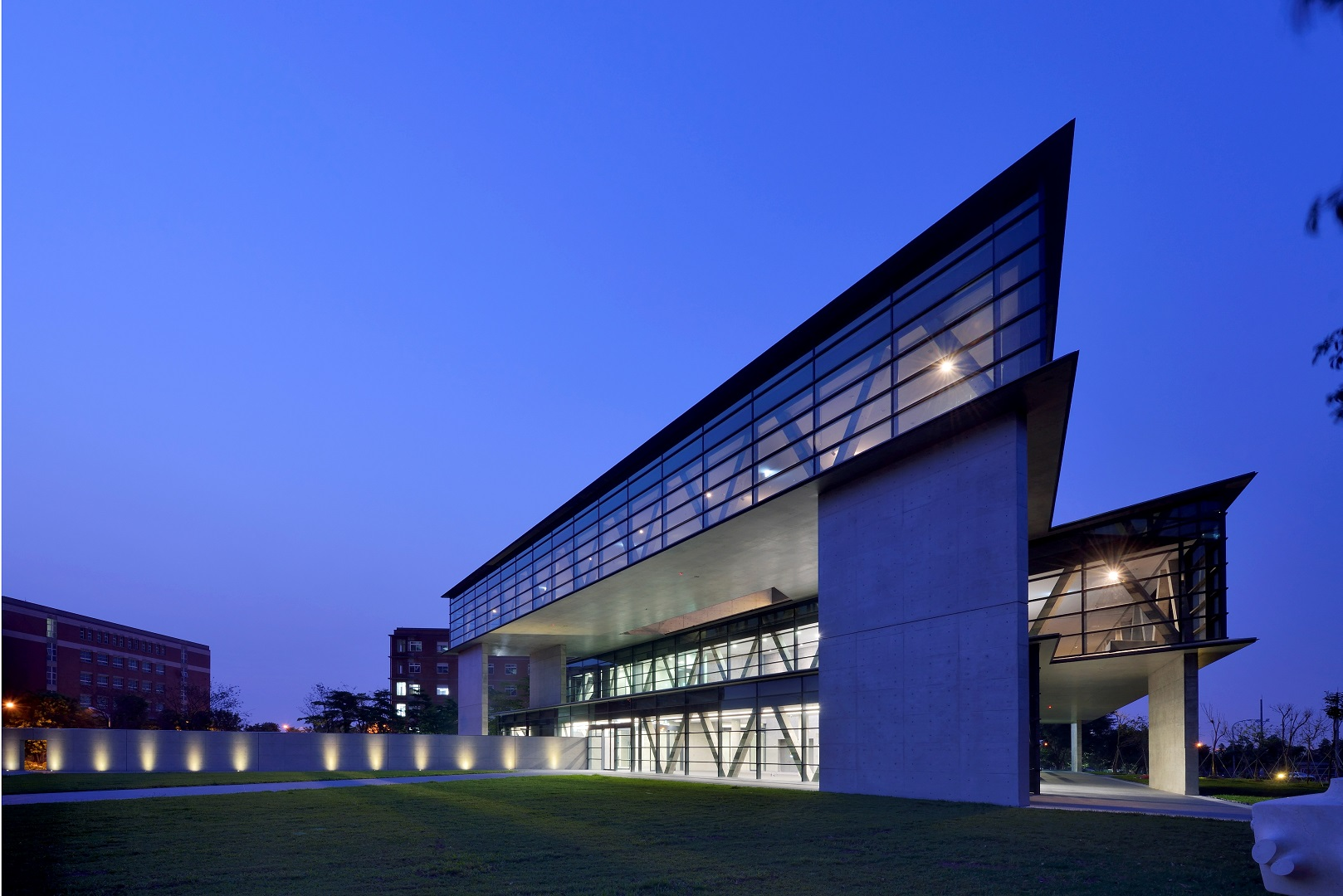 亞洲現代美術館夜景